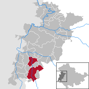 Dermbach in Thuringia - Wartburgkreis